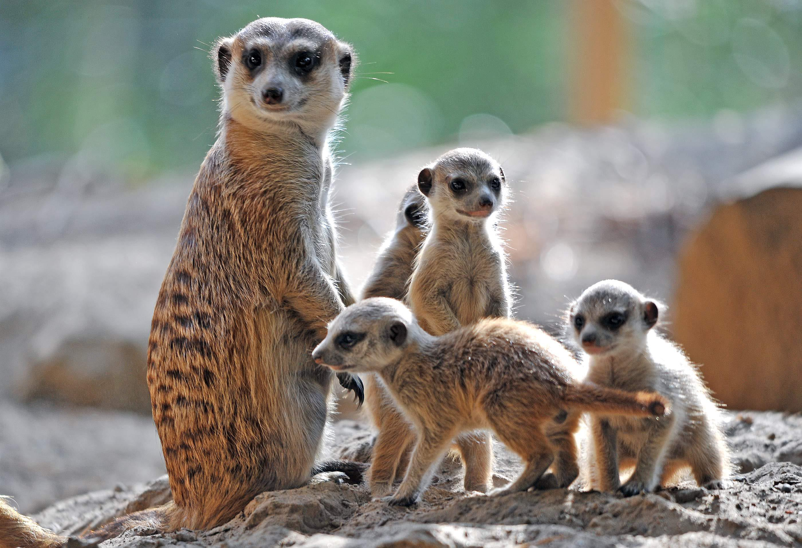 Erdmännchen mit Jungtieren im Rostocker Zoo